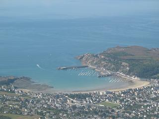 (suppr) (actu) 26 septembre 2005 à 15:28 . . Pilot'22 (Discuter) . . 320x240 (12 659 octets) (Photo aérienne d'Erquy prise le 24 septembre 2005)